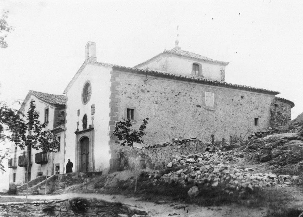 Església del Santuari de Puiglagulla i un home. Lluís Vila i d'Abadal (Entre 1910 i 1936)